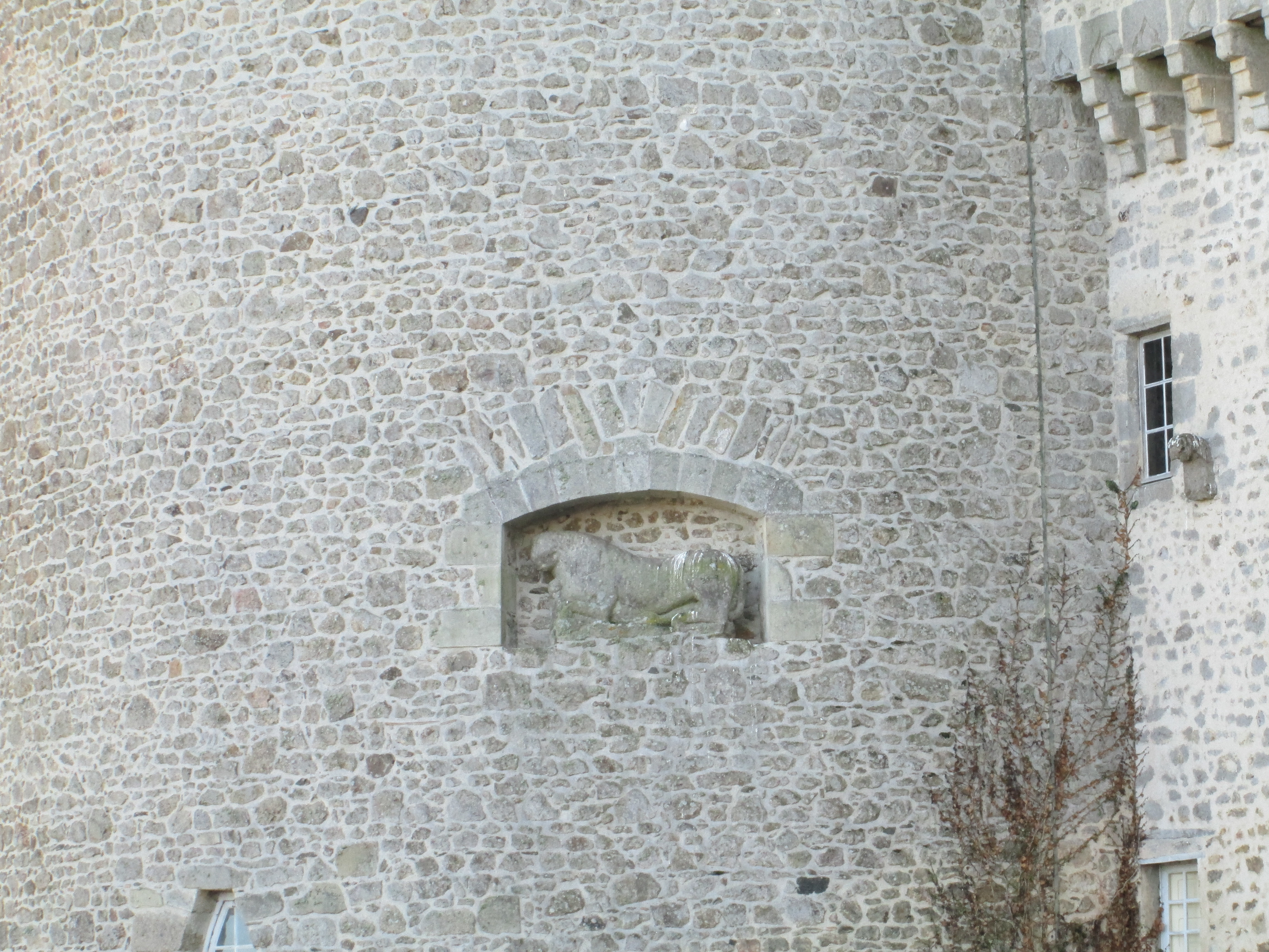 lion dans une tour du château (réémploi d'un monument gallo-romain ?)